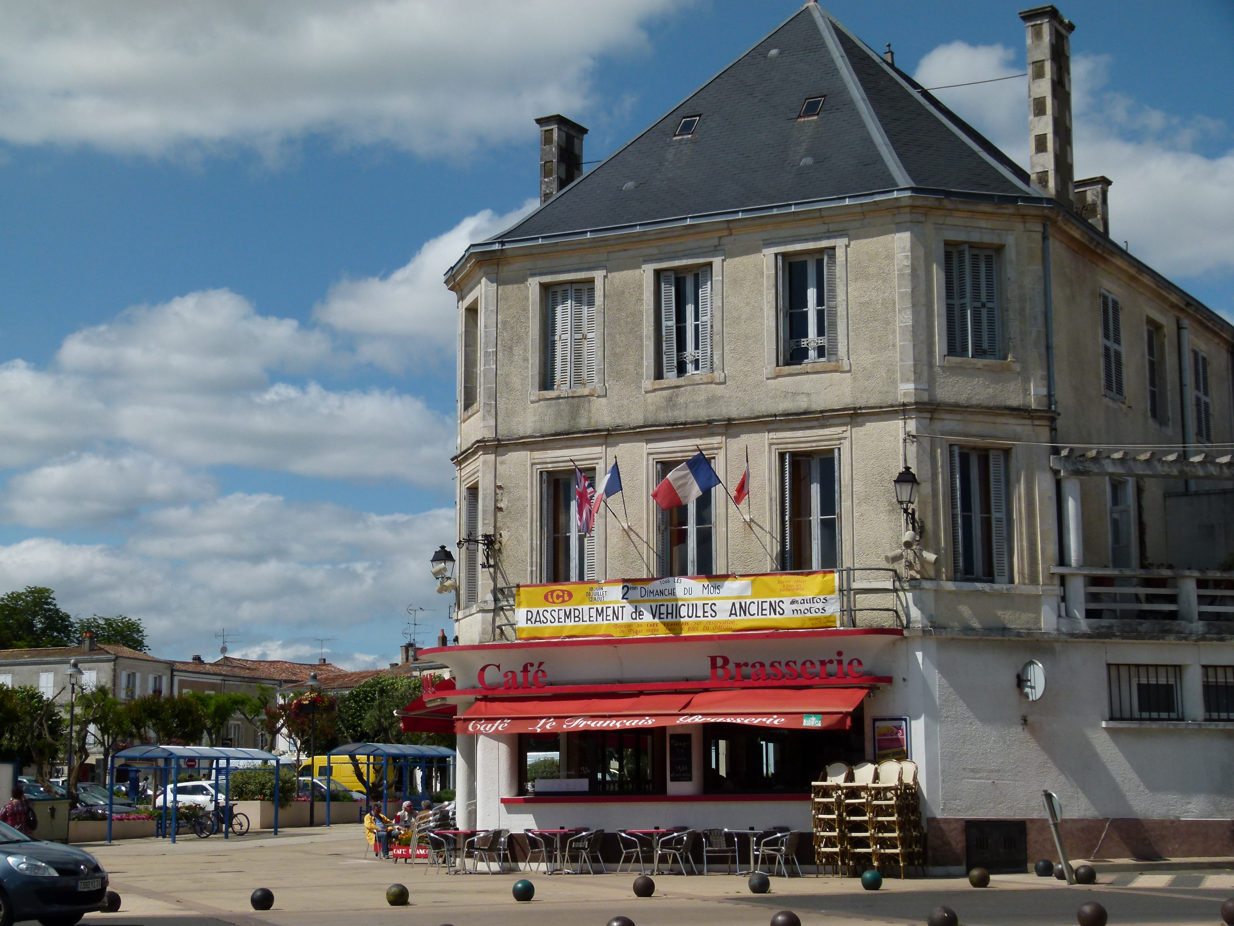 Le Café français, une institution dans la ville de Surgères ! L'immeuble occupe l'angle de la rue de la Libération et de la rue Bersot.